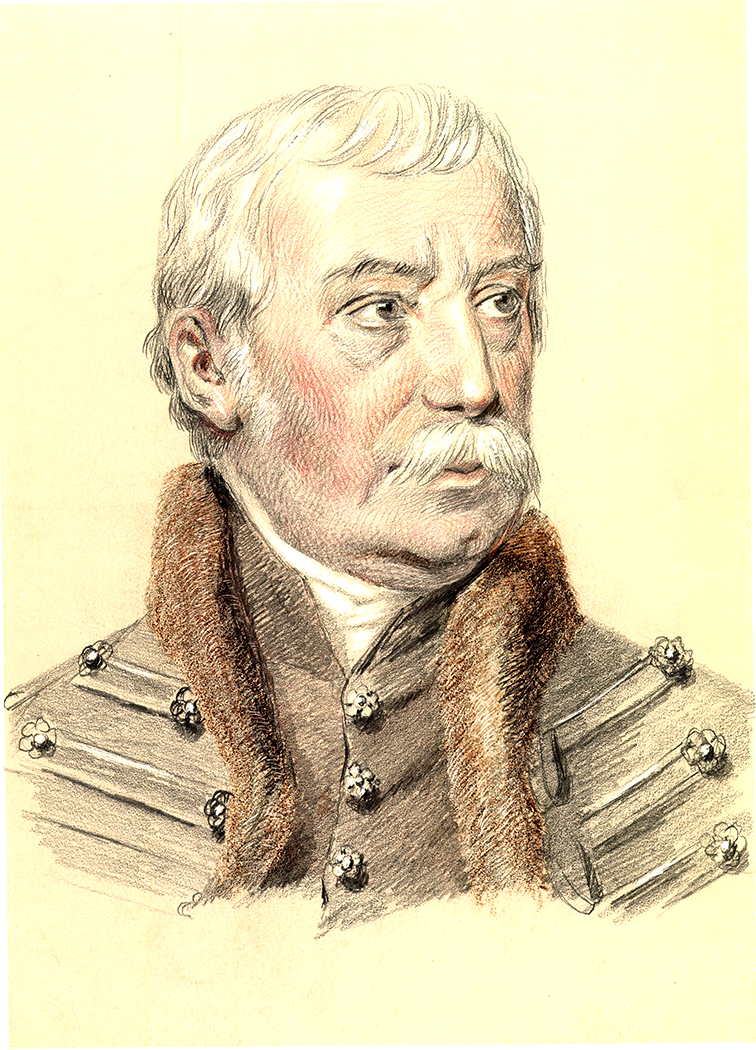 Márkusfalvi Máriássy István (Felsőbátka (Gömör megye), 1753. március 15. – Berzéte, 1830. szeptember 2.) királyi tanácsos, alispán.